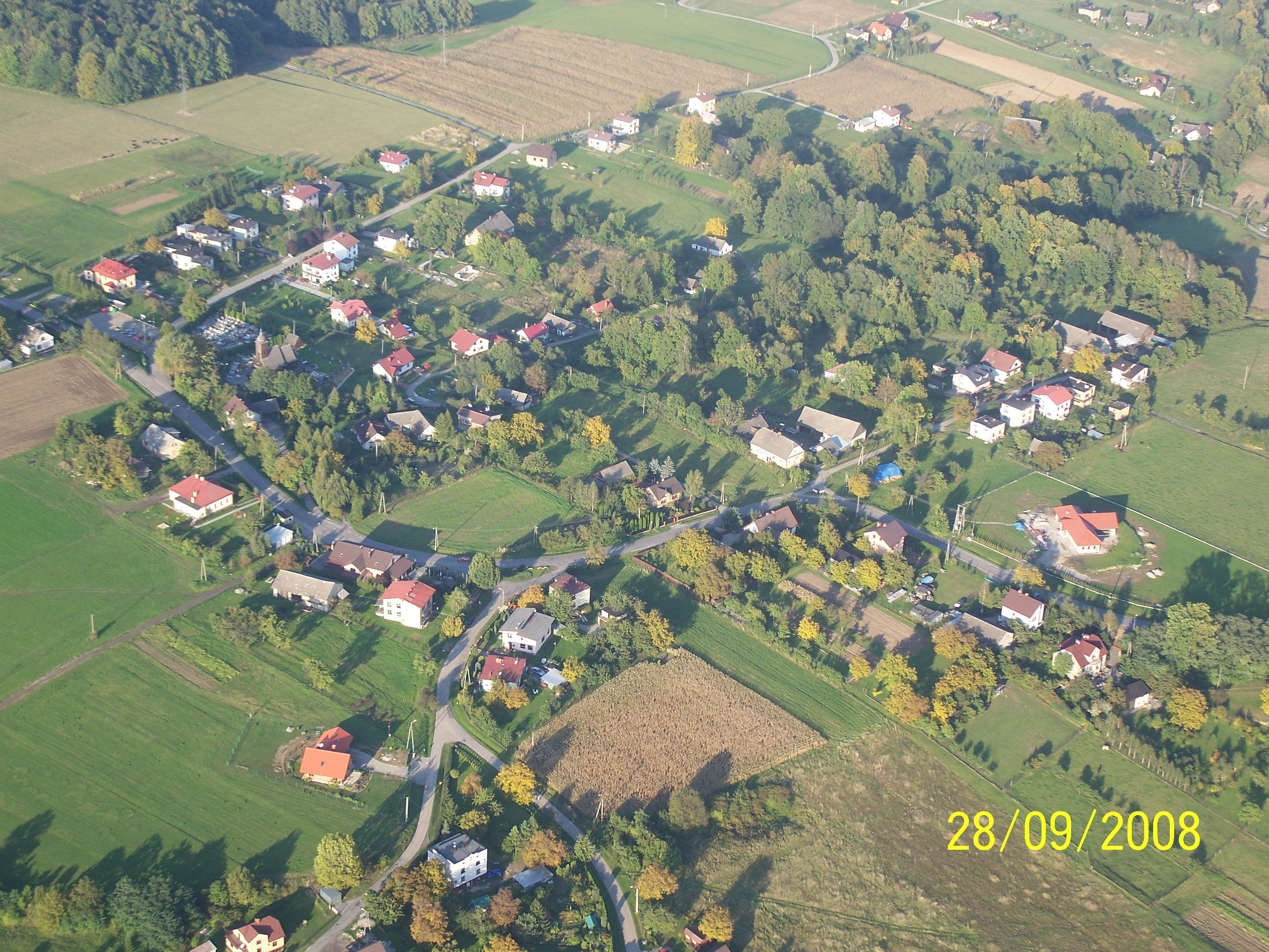 Fragment Bielowicka widziany z powietrza